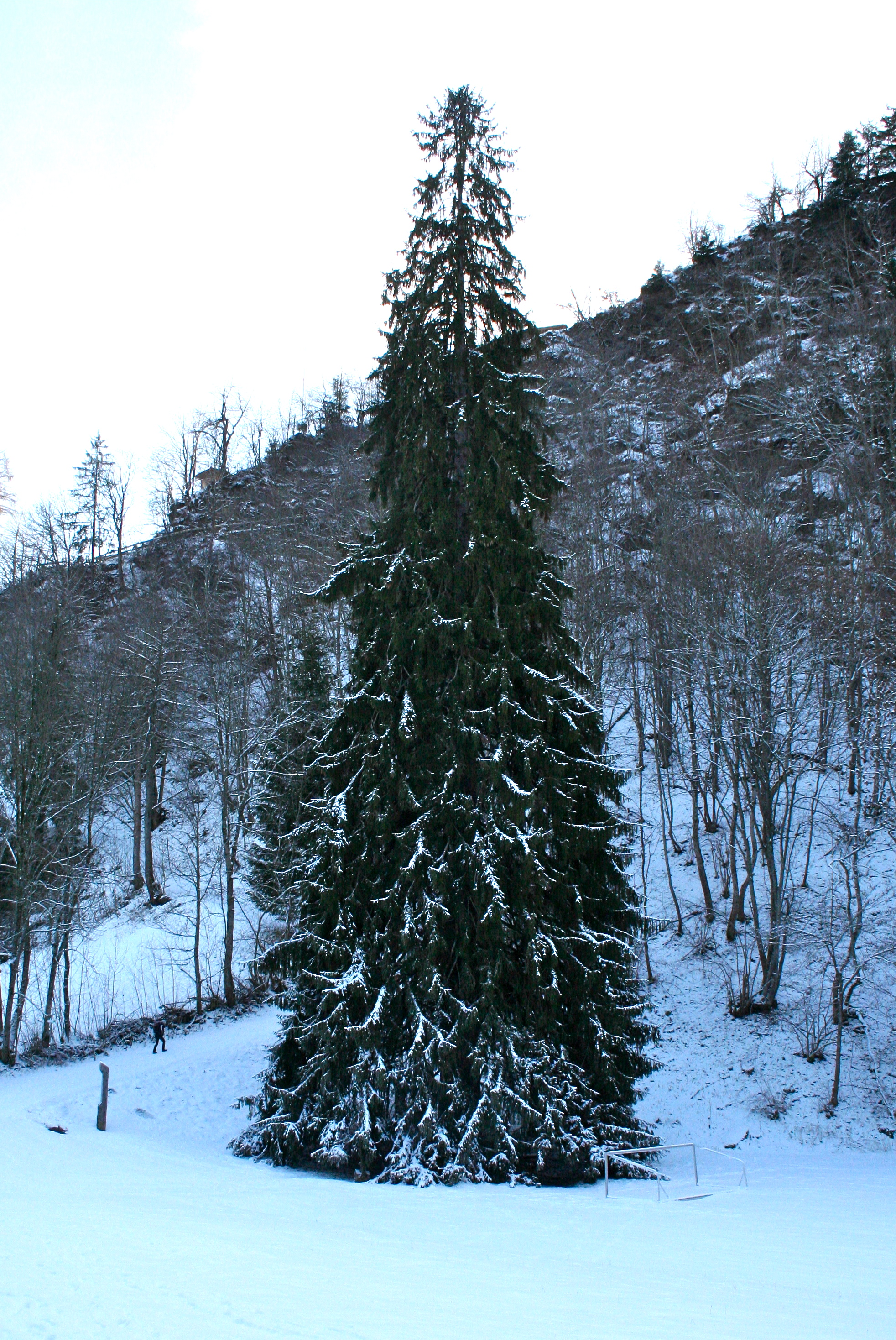 Panera (Luven) La Panera im Dezember 2010